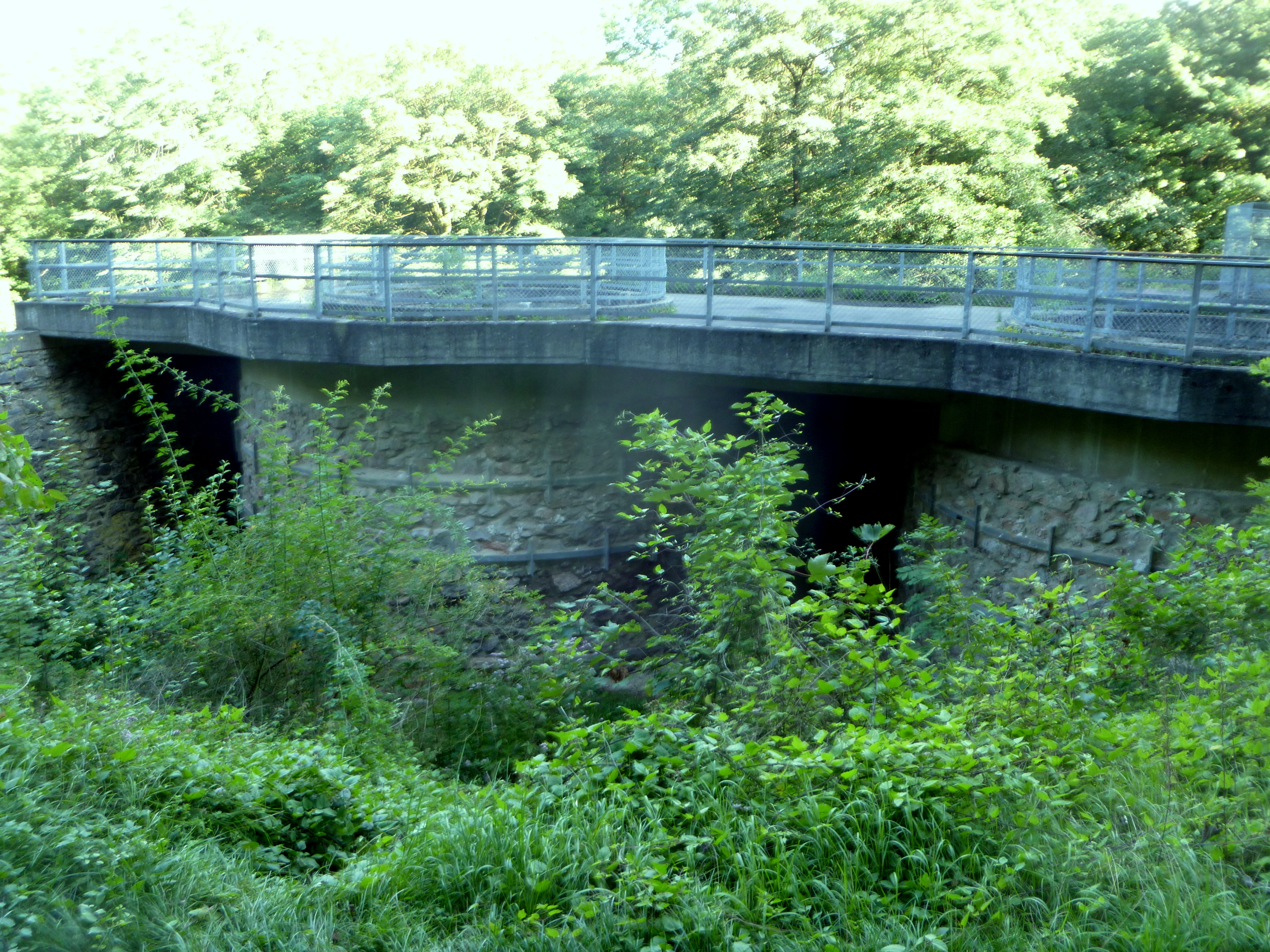 Kalkofenanlage in Aachen-Walheim; Baudenkmal in Aachen-Walheim